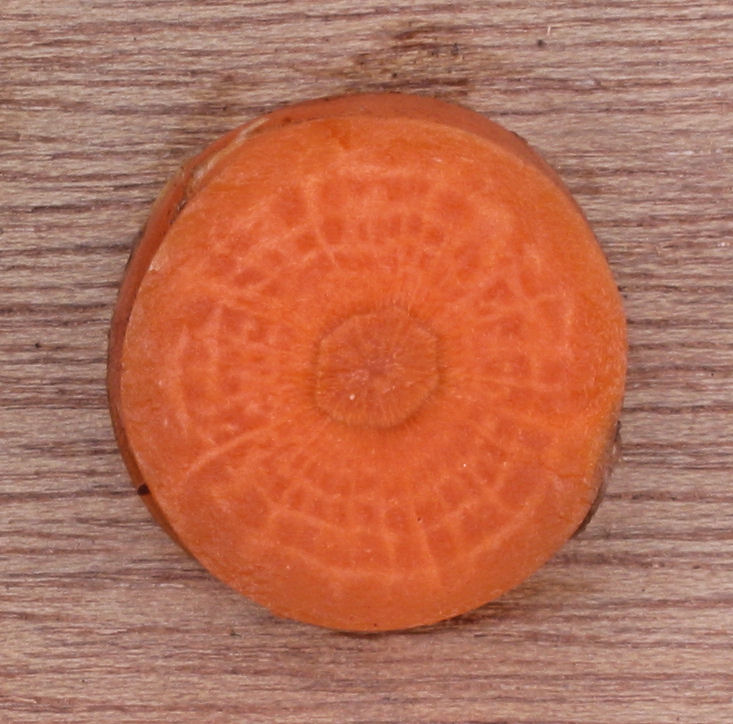 Dwarsdoorsnede wortel Daucus carota 'Amsterdamse bak'.